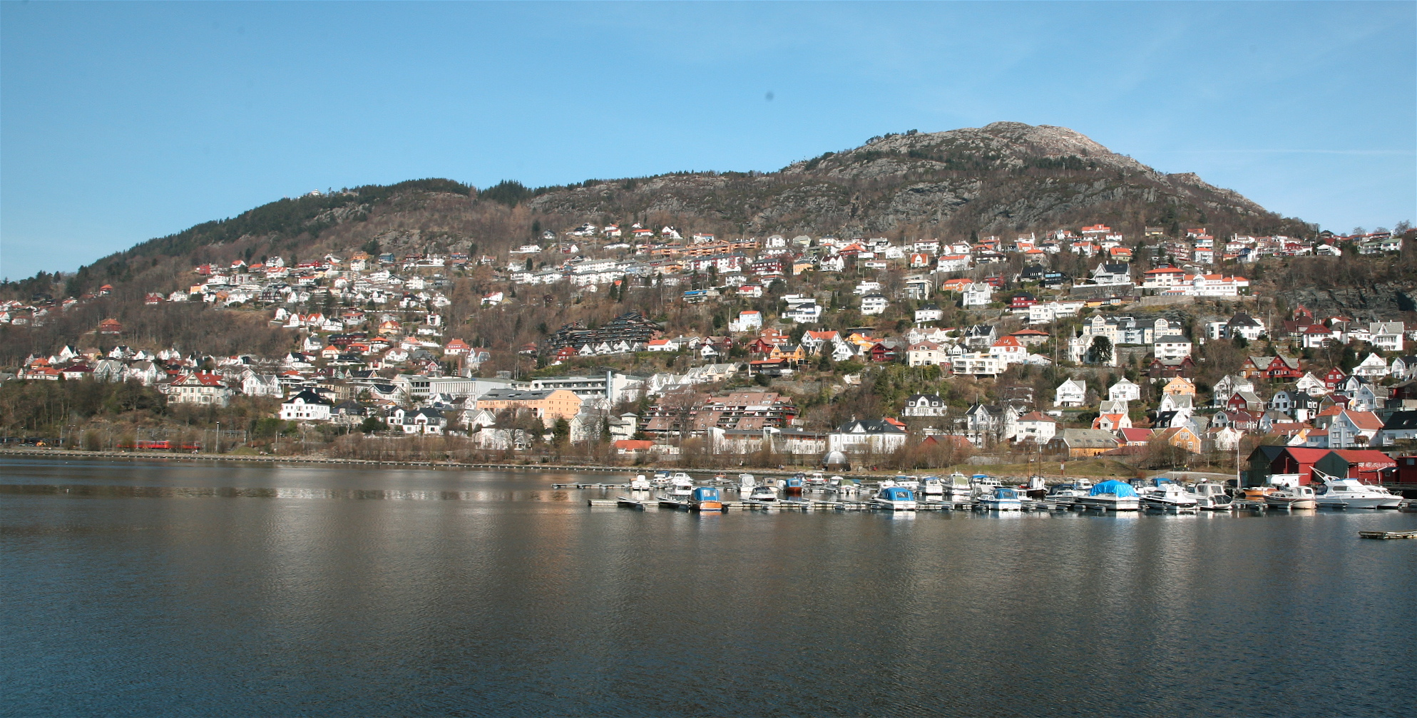 Fjellsiden sør i Bergen.